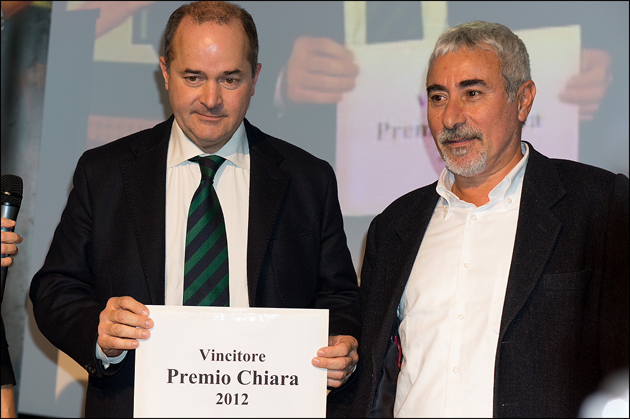 Premiazione